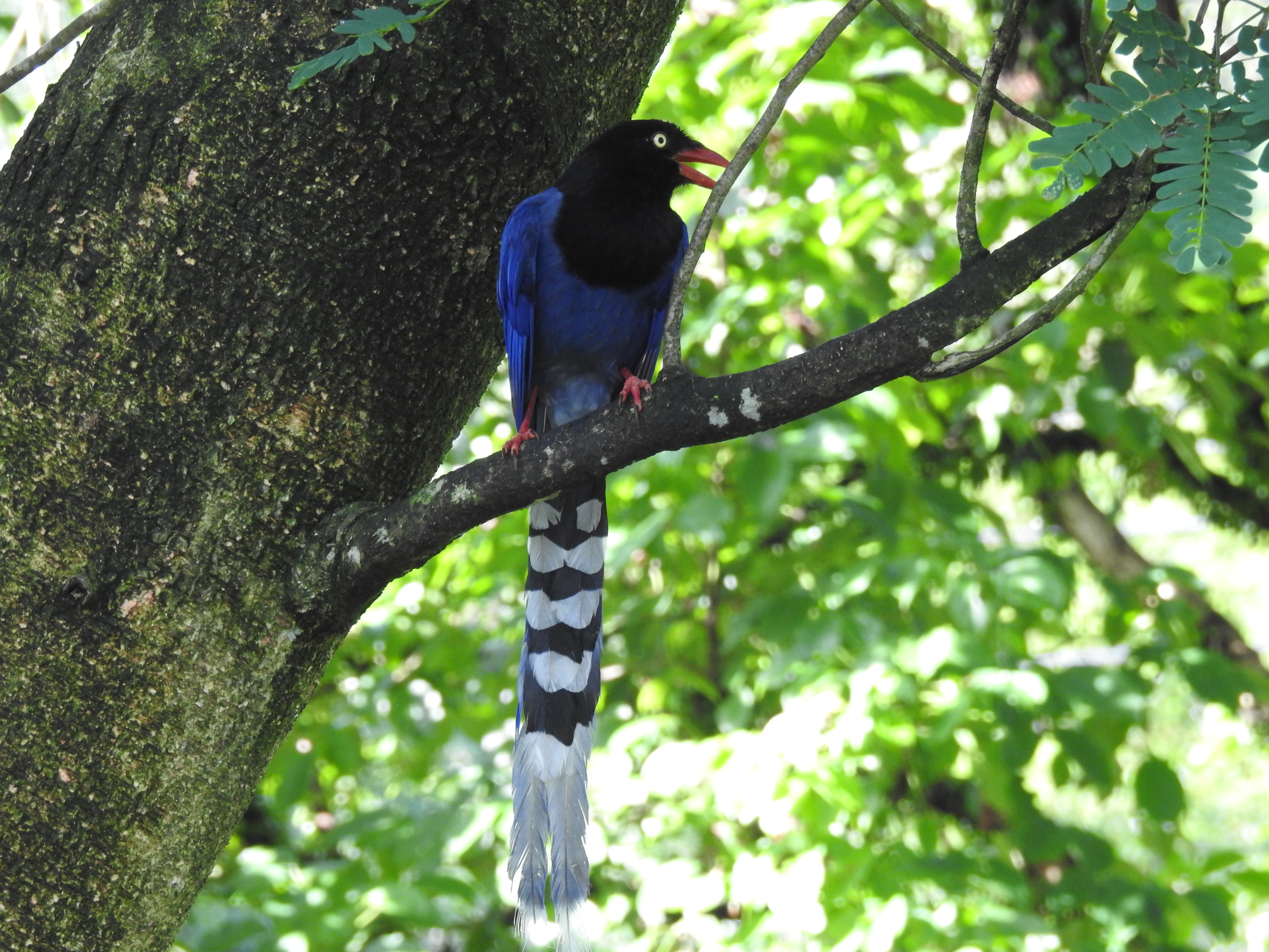 拍攝於基隆暖西水庫